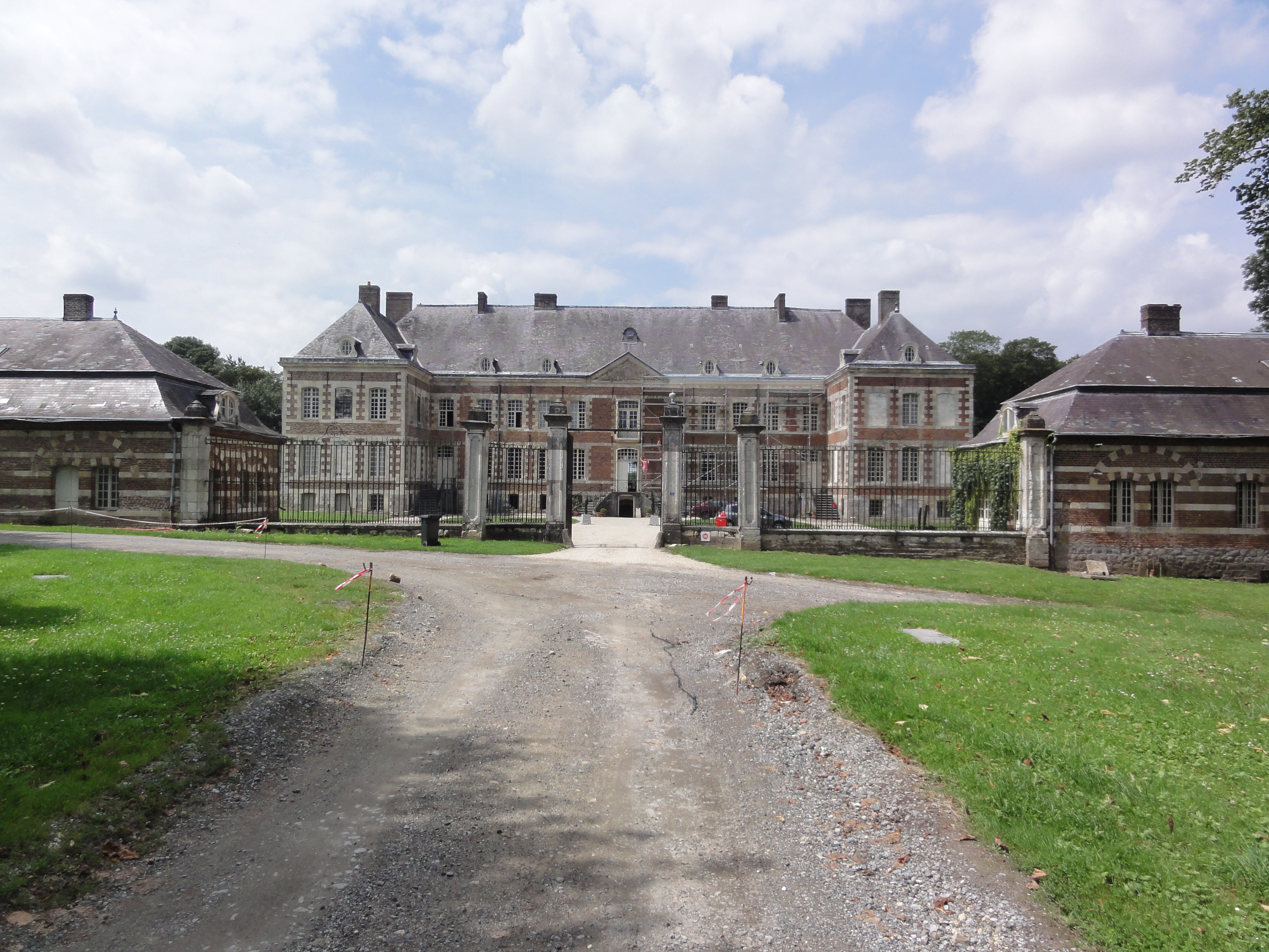 Aisonville-et-Bernoville (Aisne) château